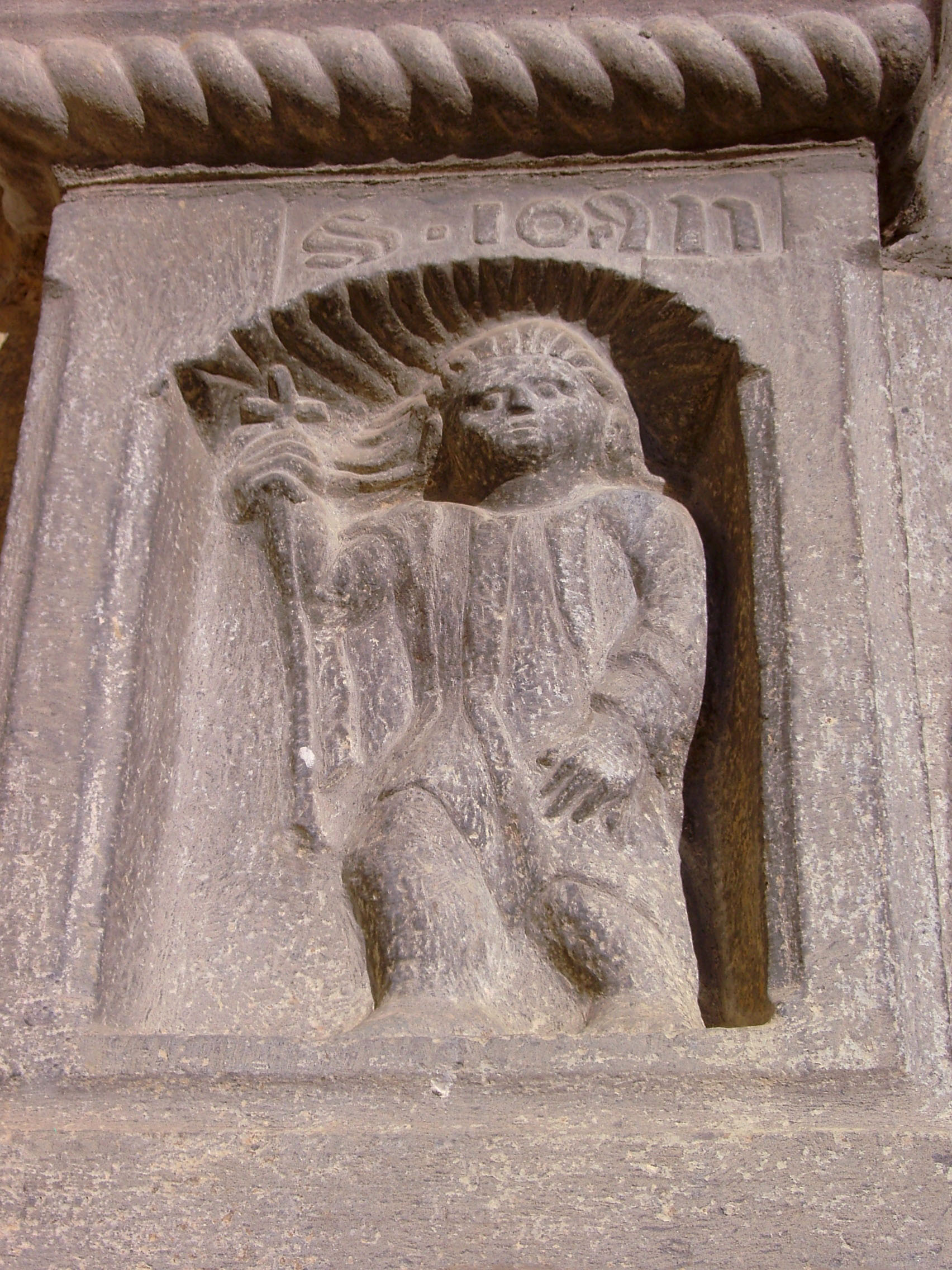 Una imagen de San Juan esculpida en el dintel del portal de la iglesia de San Pedro de Broto. La leyenda es clara: "S. IOAN".